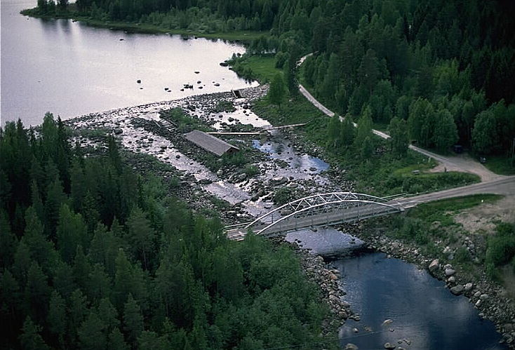 Fiskhuset Motiv: Aldern Nyckelord: Flygbilder, Riksintressen Kategori: Insjömiljöer Fiskhuset.